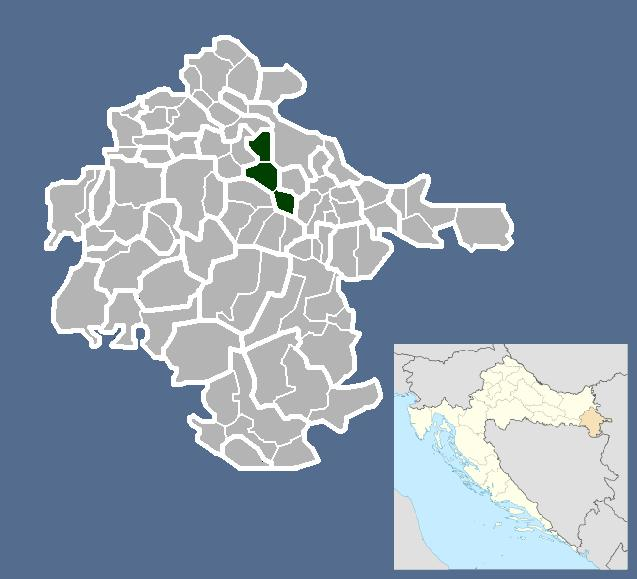 Српски (ћирилица): Општина Богдановци.